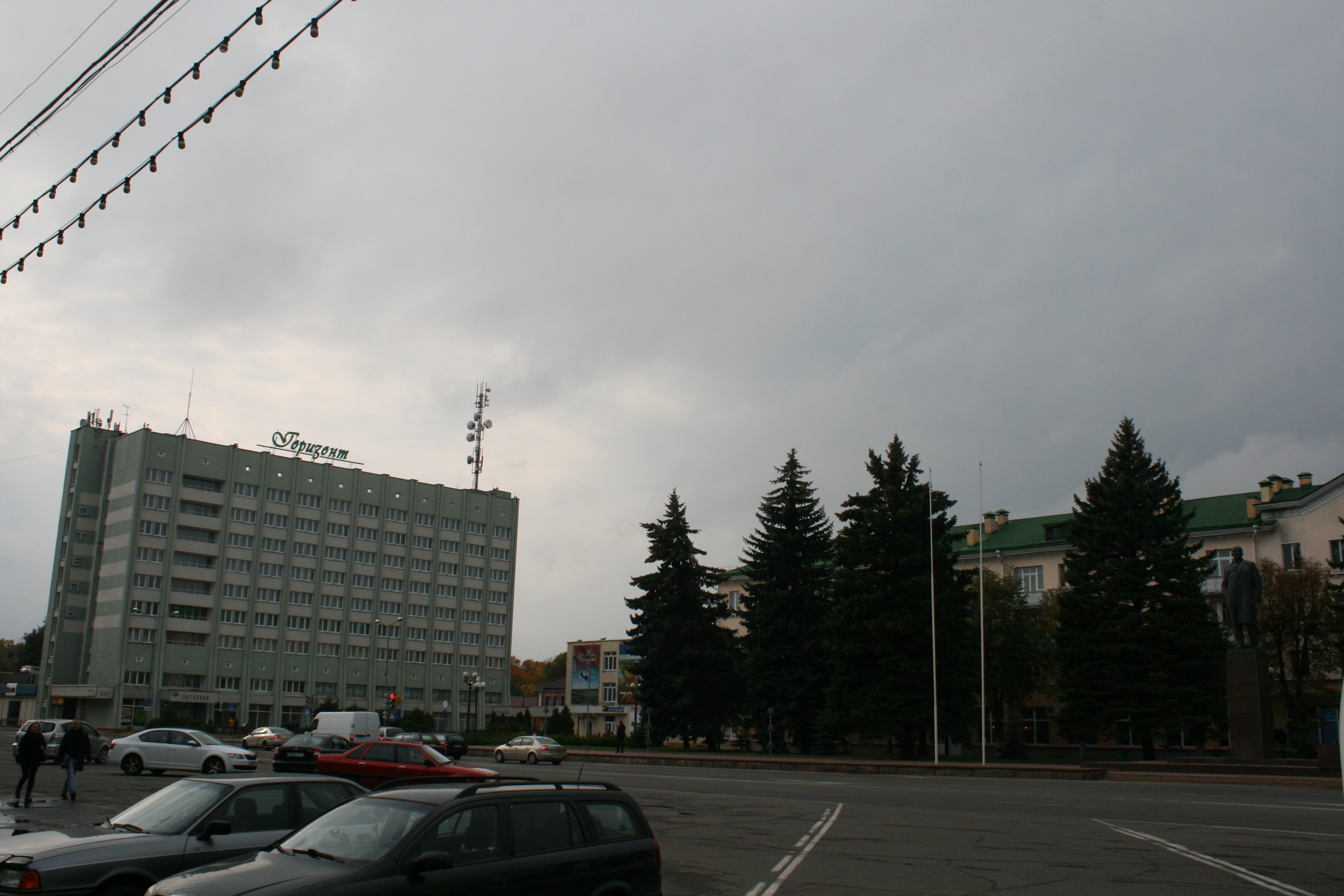 гасцініца Гарызонт